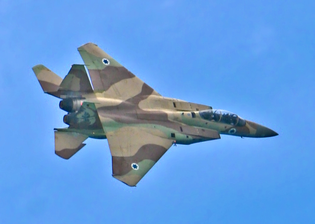 מפגן חיל האוויר יום העצמאות ה-60 למדינת ישראל